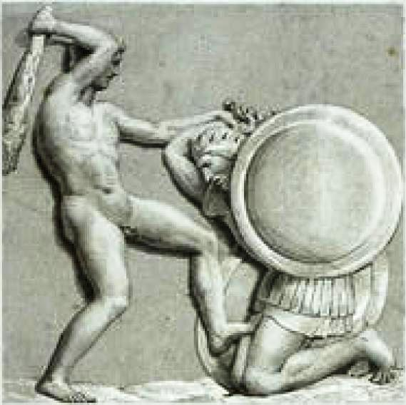 Αναπαράσταση μετόπης από τον Ναό του Δία στην Ολυμπία